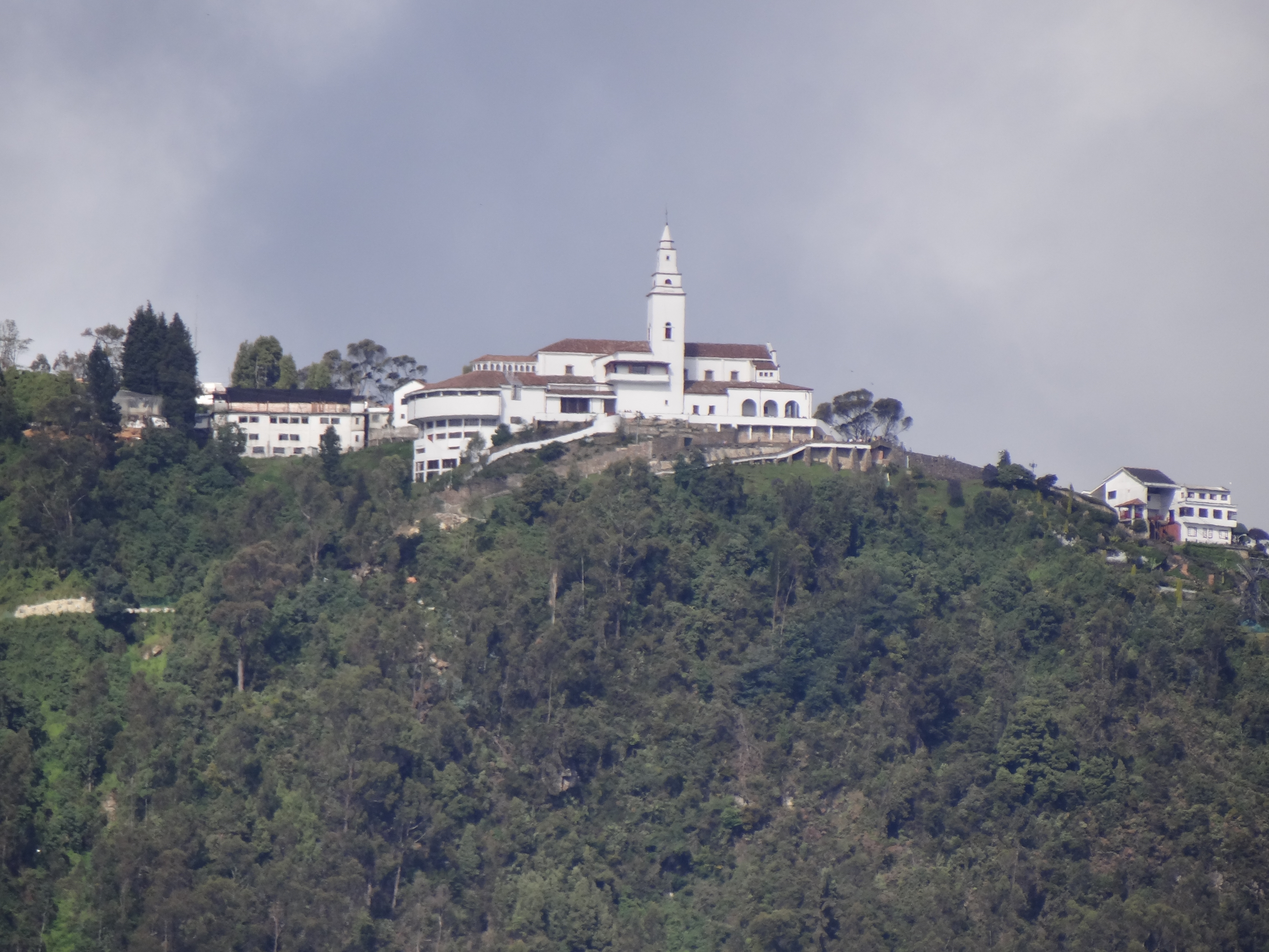 Iglesia, cerro de Monserrate, Bogotá, Colombia